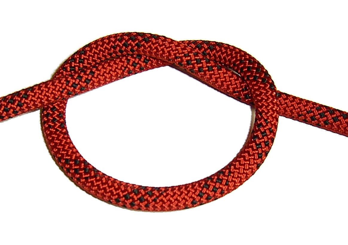 Überhandknoten